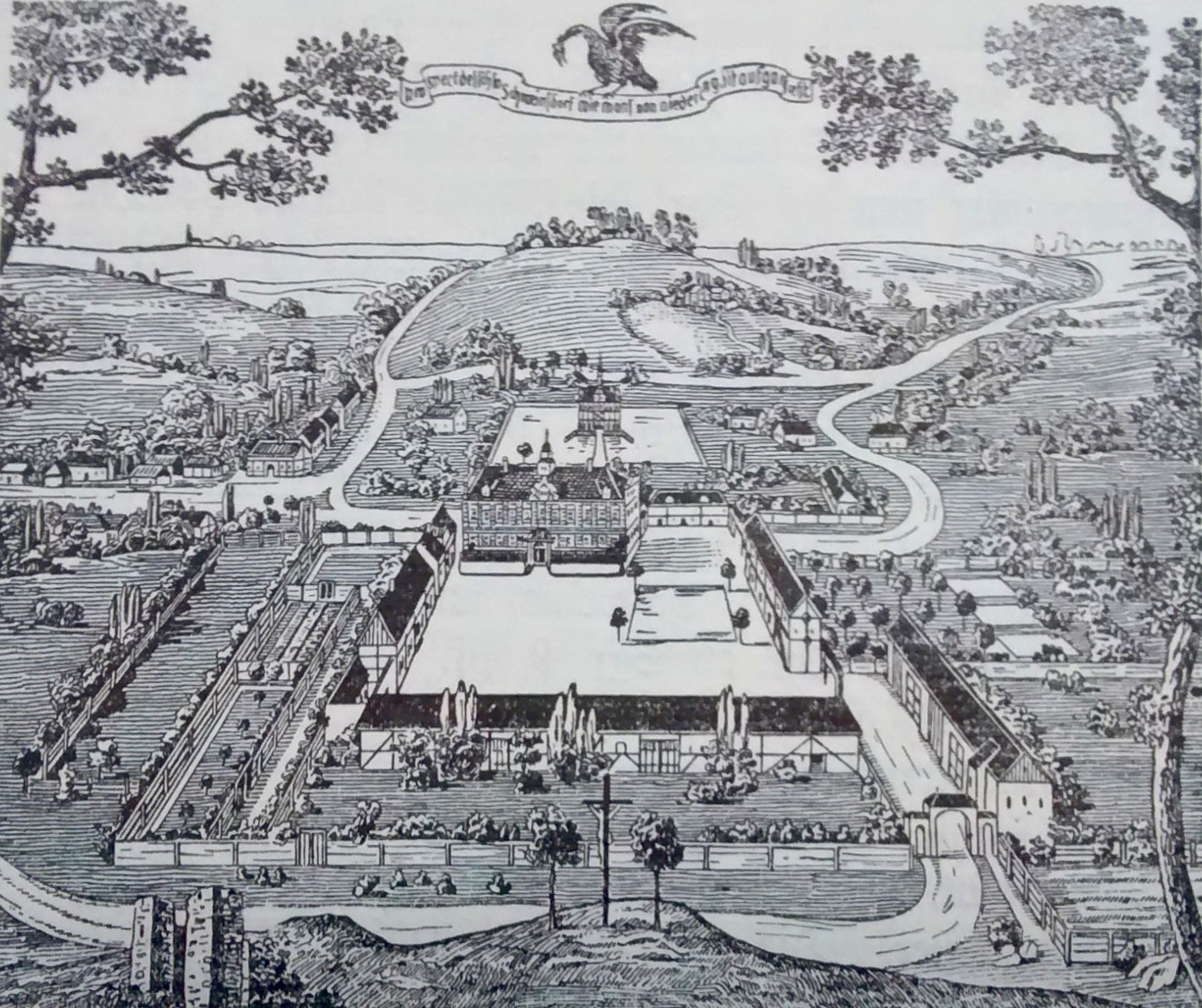 Pałac (Schloss Schweinsdorf) w Piorunkowicach.